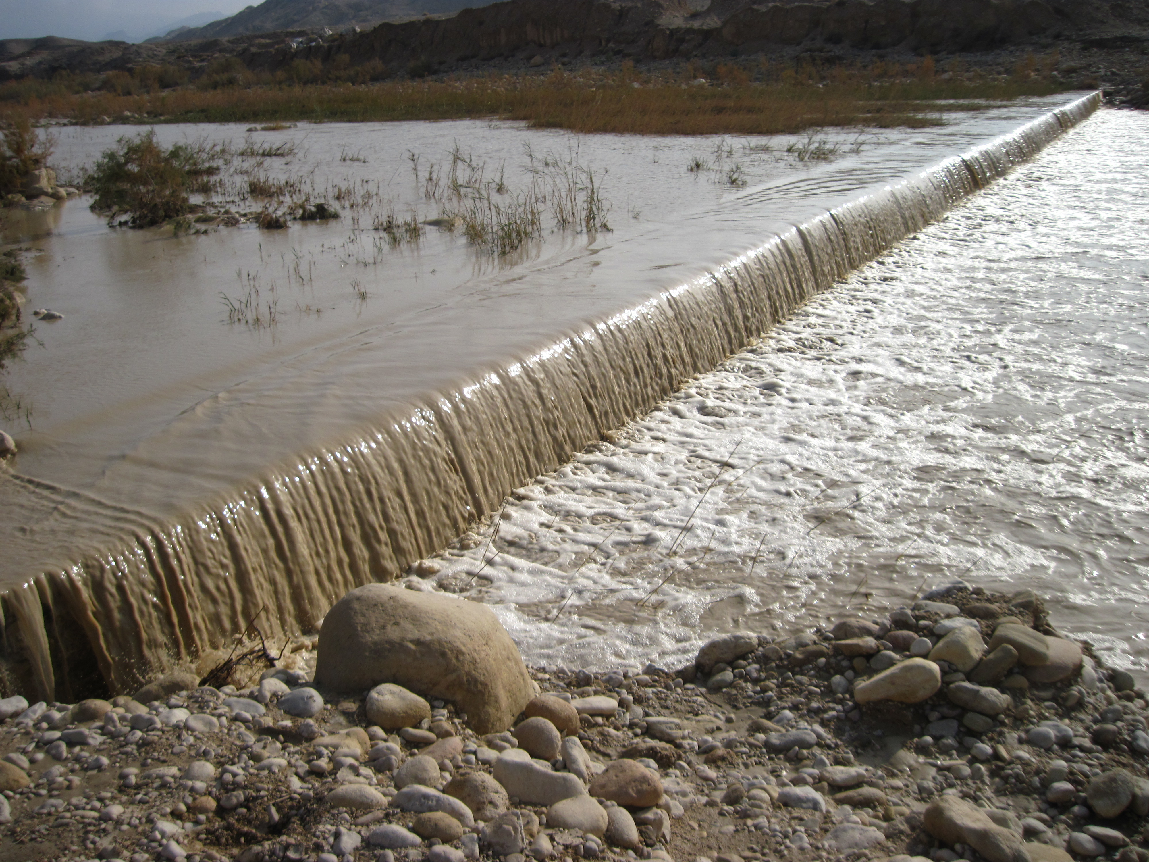 رود خانه